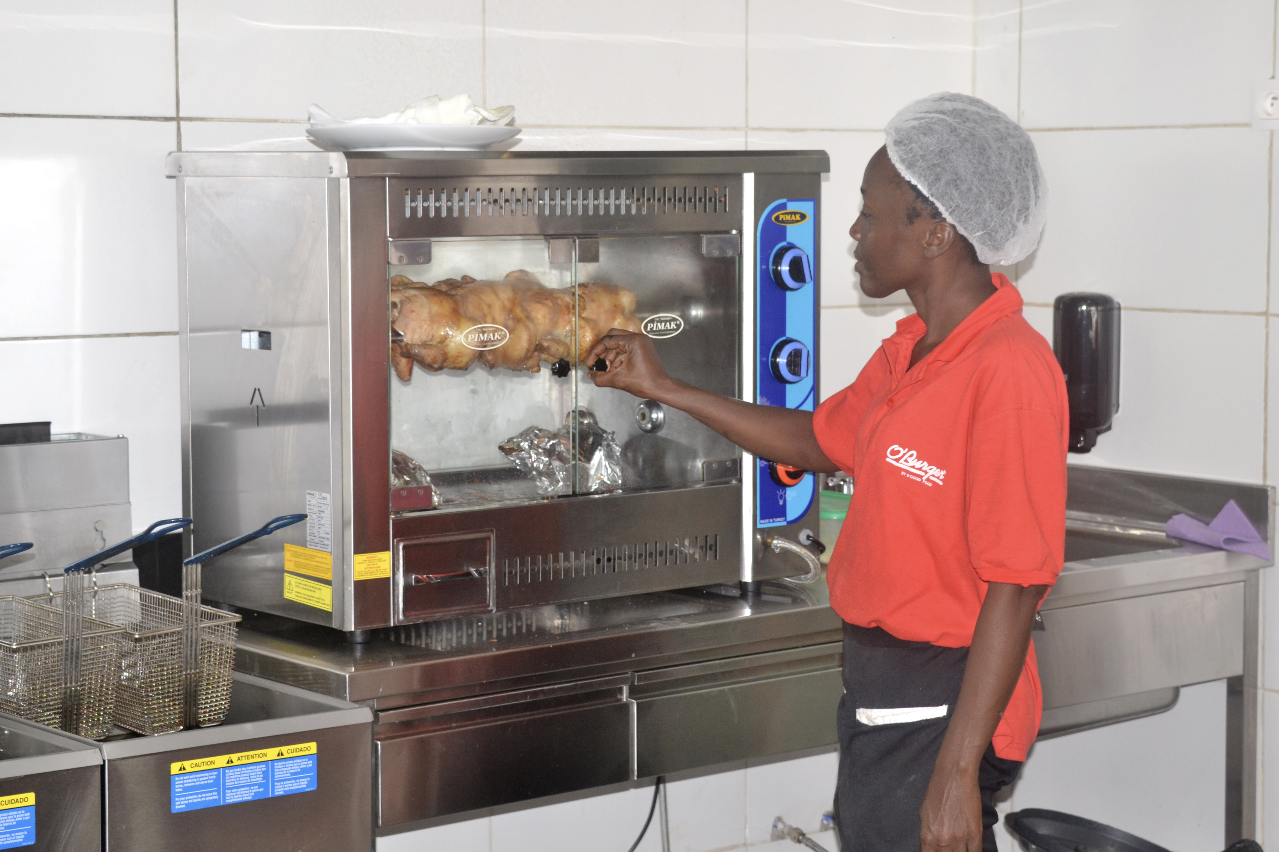 une cuisinière ivoirienne dans la ville d'Abidjan. This is an image of "African people at work" from Ivory Coast